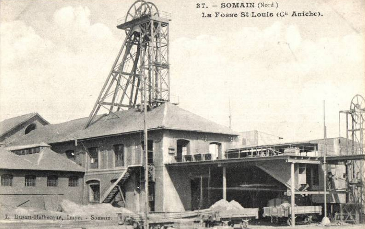 La Fosse Saint Louis de la Compagnie des mines d'Aniche était un charbonnage constitué d'un seul puits situé à Somain, Nord, Nord-Pas-de-Calais, France.